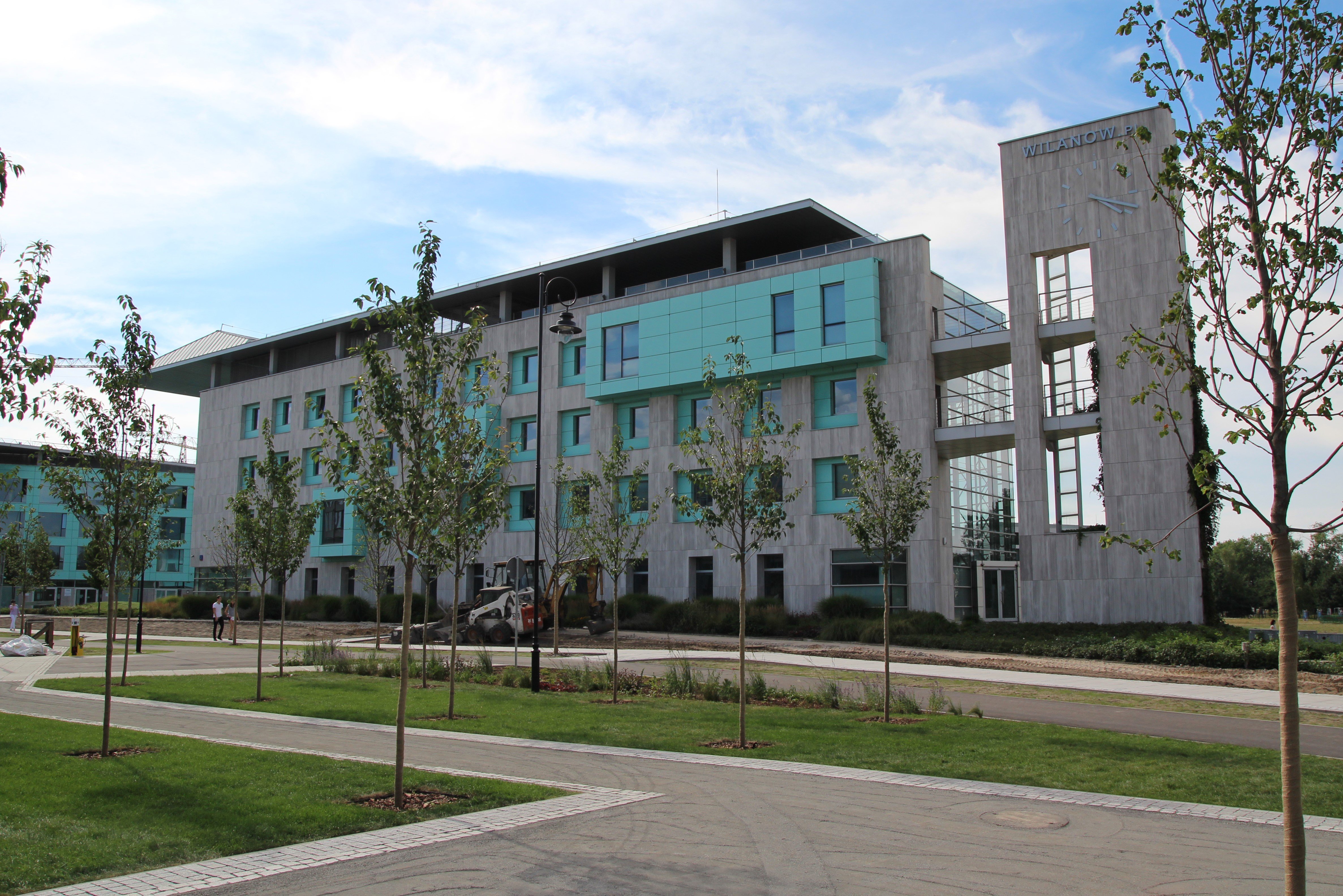 Townhall Wilanów